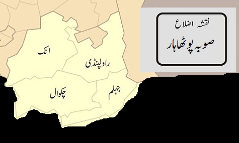 تحریک صوبہ پوٹھاہار نقشہ